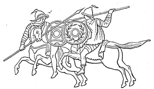 Andabatae - afkomstig uit Meyers Konversationslexikon 1888 - vrij van auteursrechten